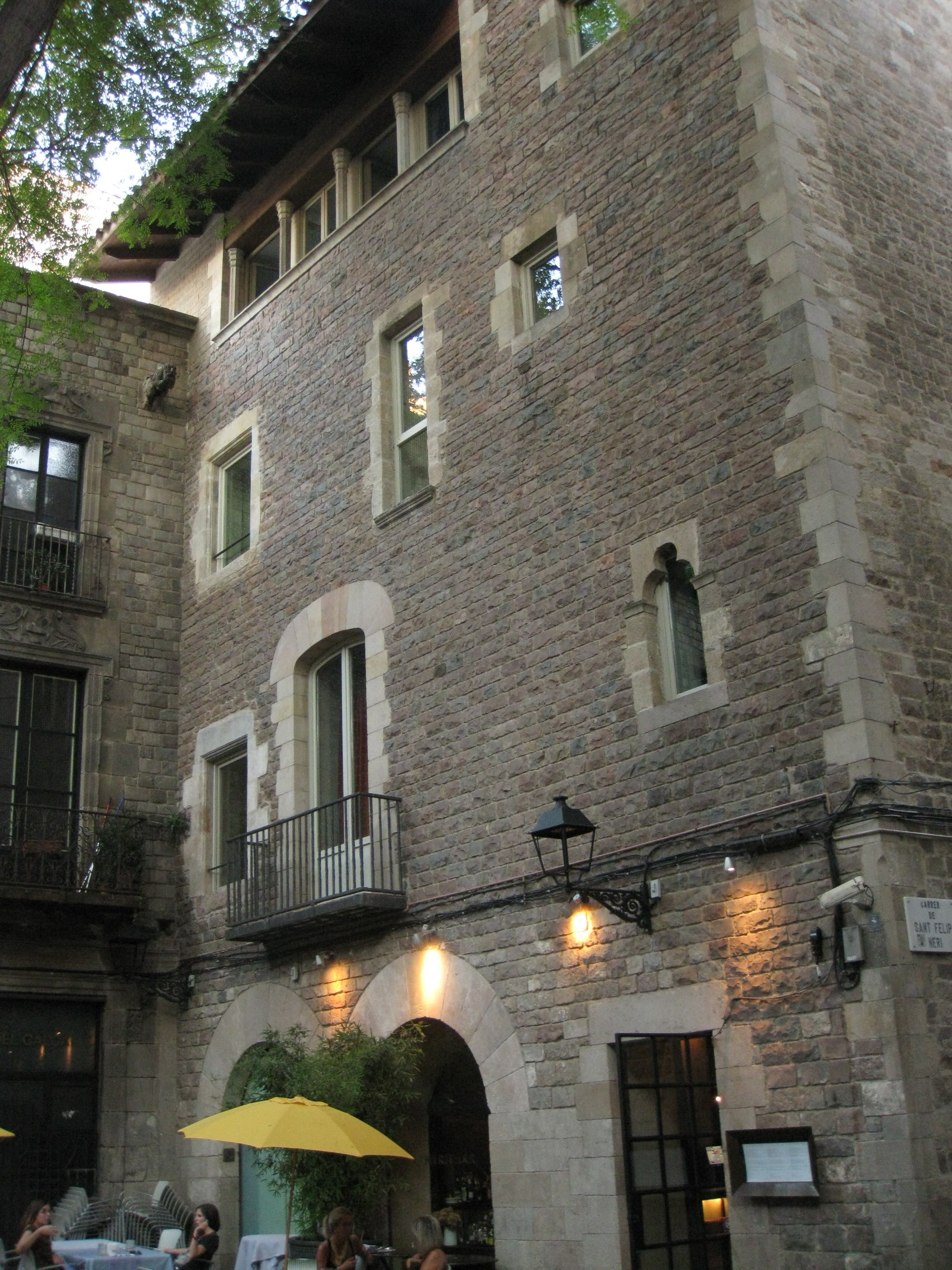 Casa Gironella, conjunt d'edificis del segle XVIII, avui convertits en l'hotel Neri, amb façanes als carrers de Sant Sever i Sant Felip Neri i a la plaça de Sant Felip Neri. A la imatge, la façana de la plaça de Sant Felip Neri, transformada arran de la Guerra Civil.